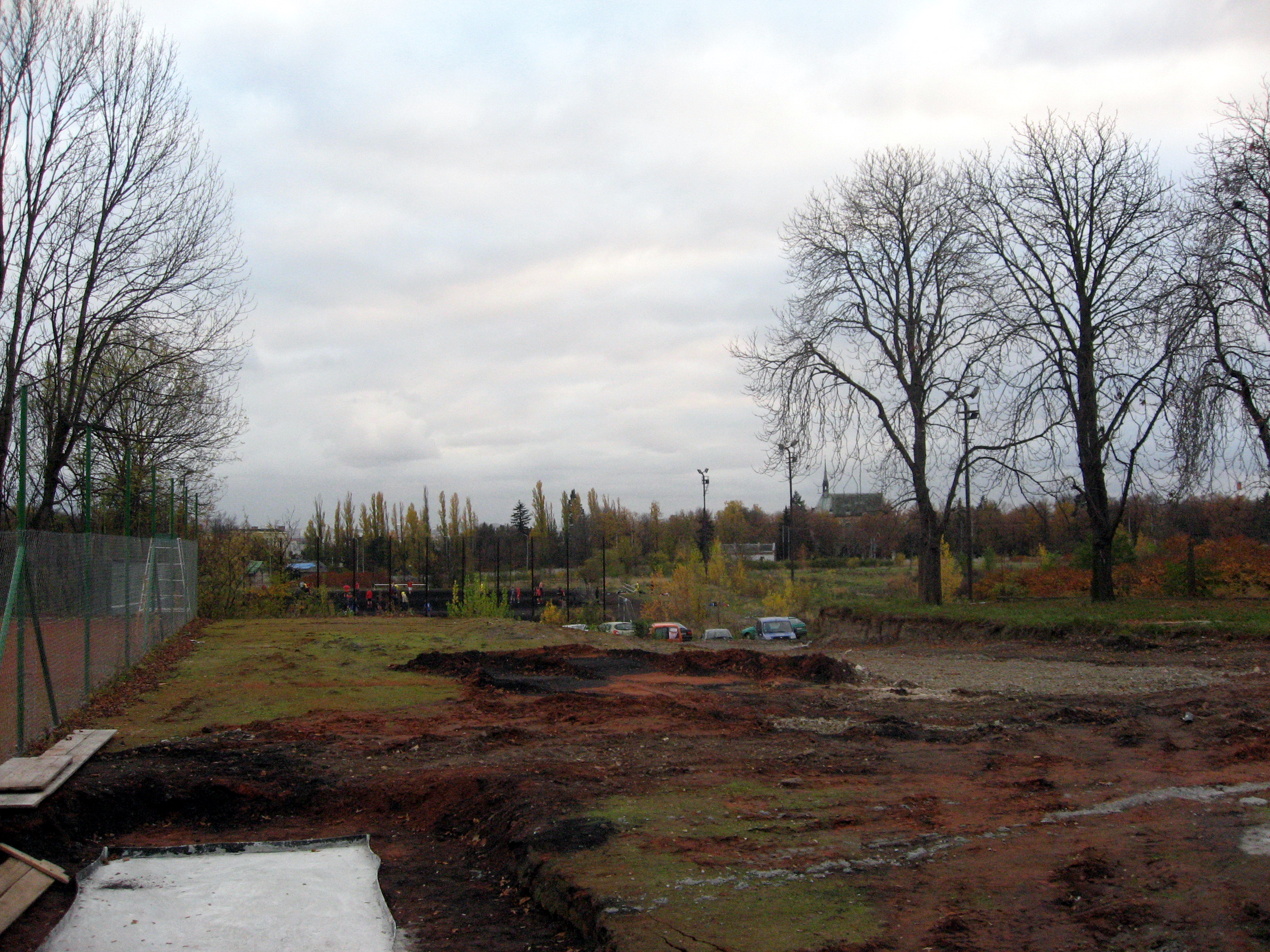 Oblast Hagiboru